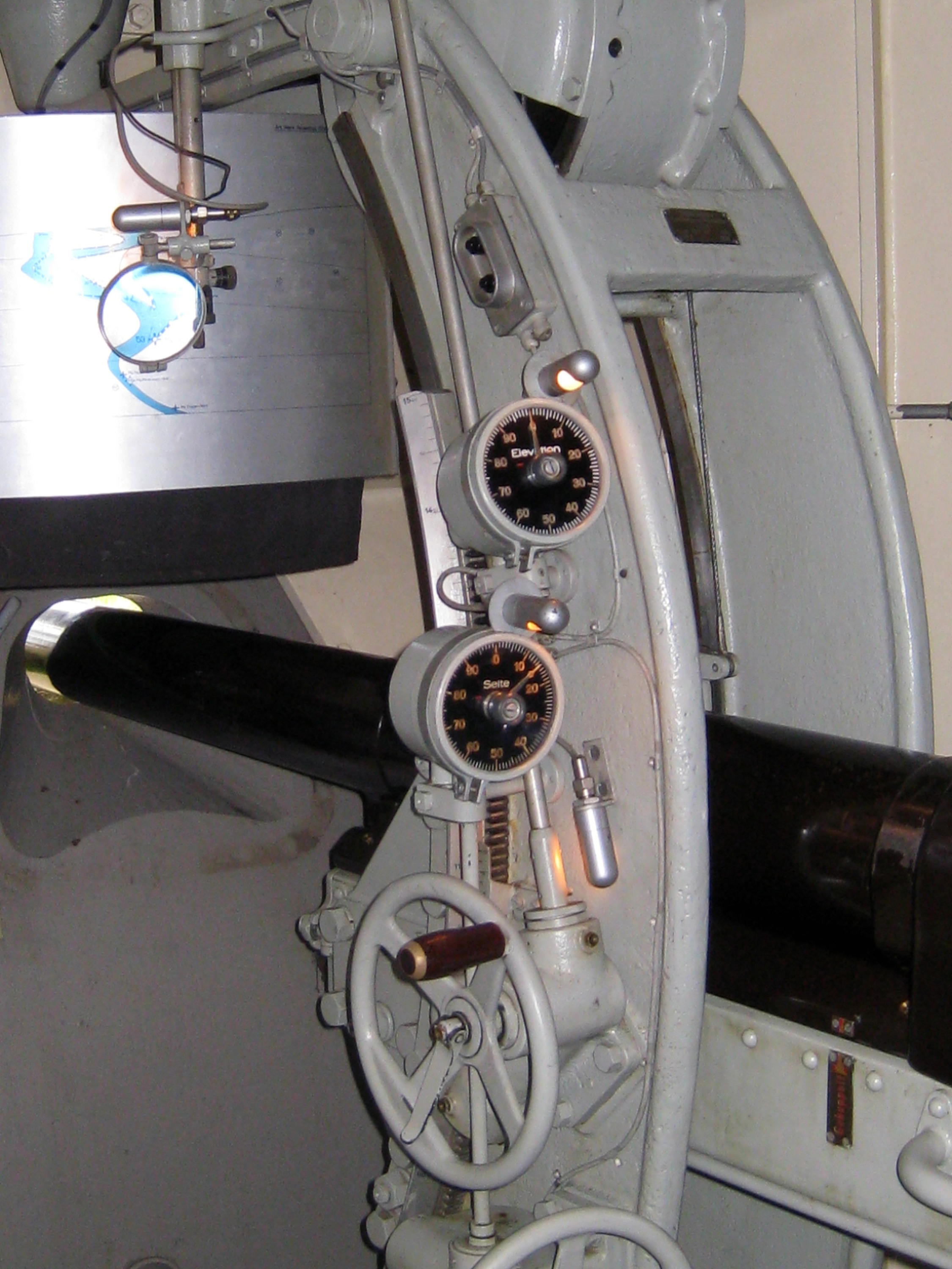 Innenansicht Geschütz 2 im Festungsmuseum Reuenthal